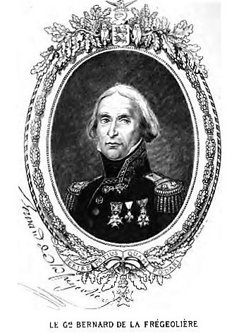 Le général Bernard de La Frégeolière